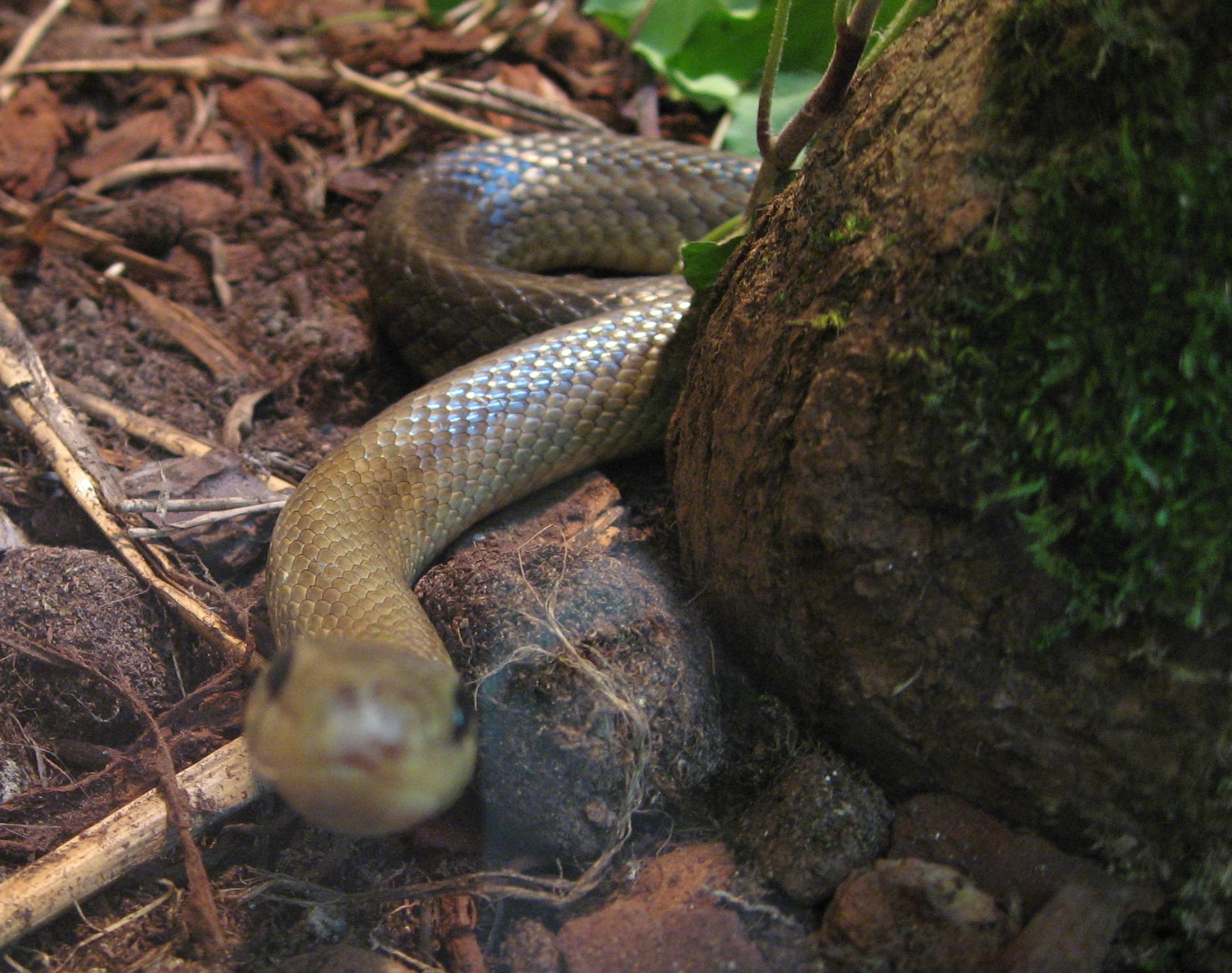 Zamenis longissimus in Zoodyssée